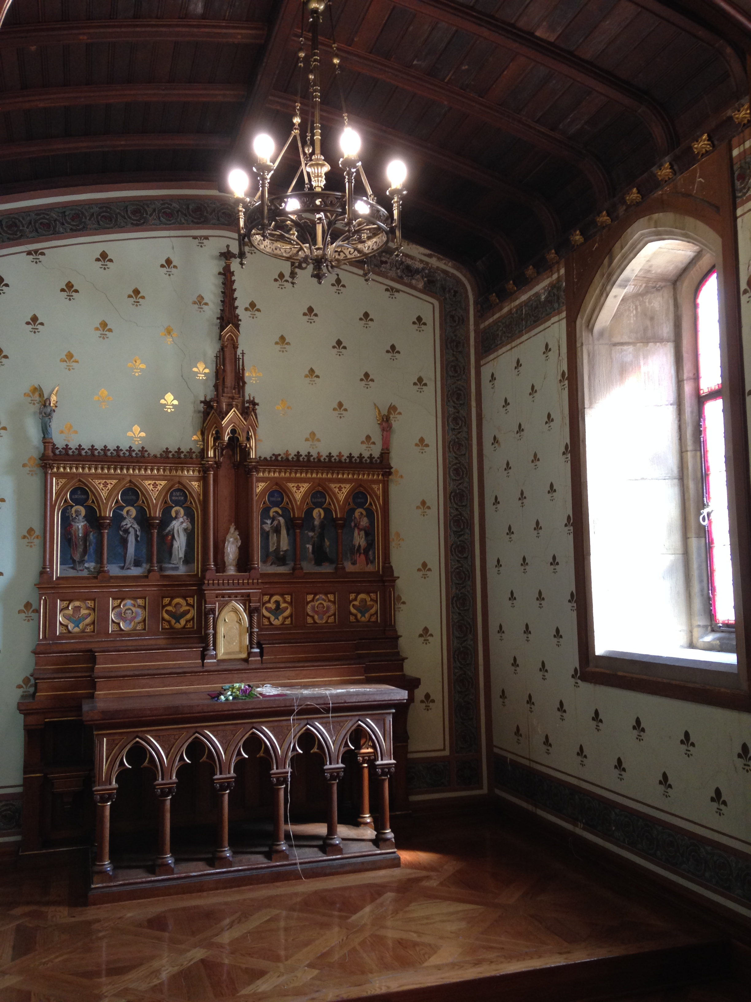 Miramar jauregiko barnealdea: Kaperako aldare neogotikoa